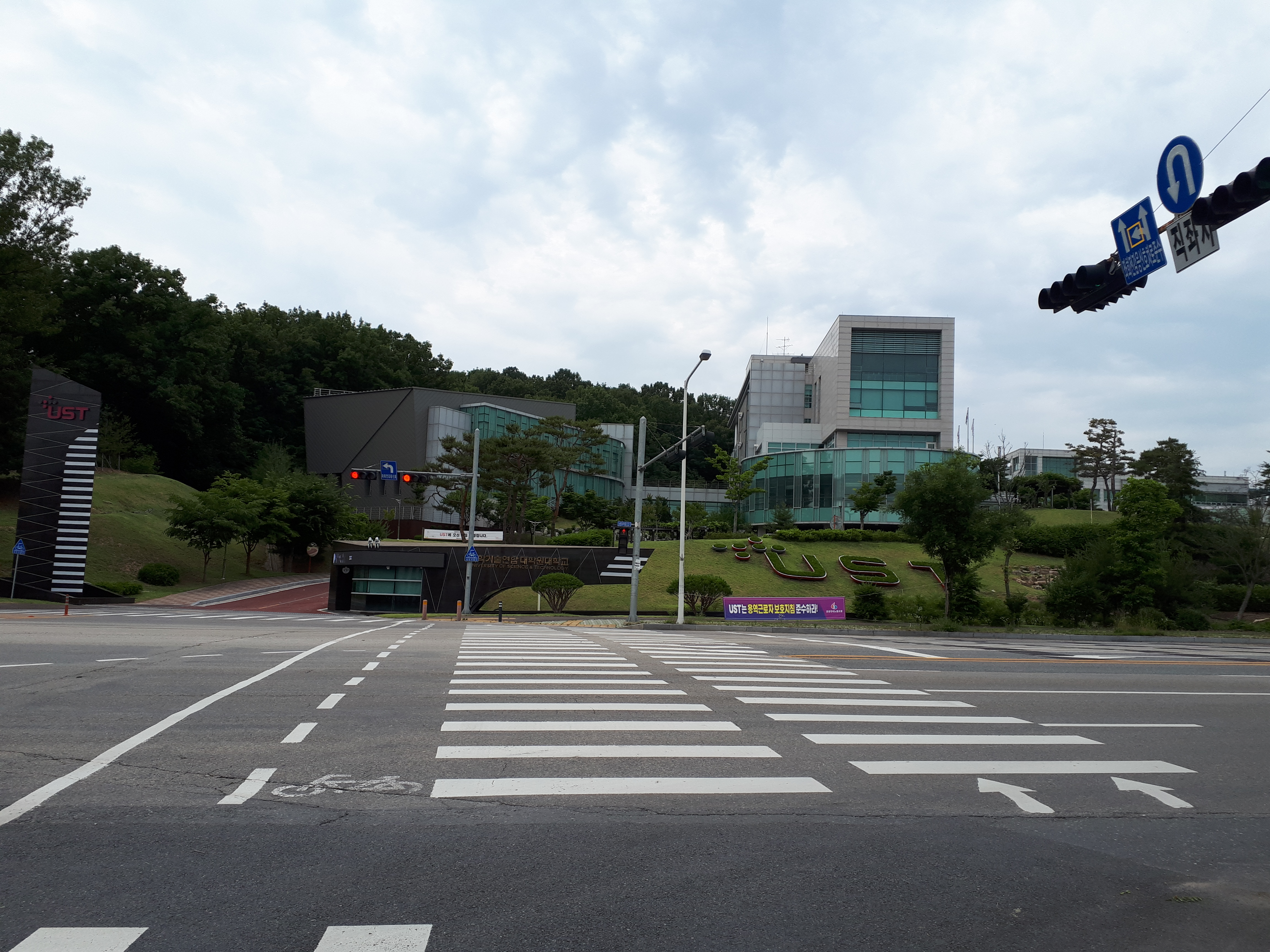 과학기술연합대학원대학교